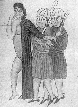 Актриса армянского театра гусанов-мимосов. На ней специальный сценический костюм, то закрывающий, то целиком обнажающий ее тело, в зависимости от того, как она повернется к зрителям. Изображена в армянском евангелии конца XIV столетия как пример человека, в которого вселился бес.